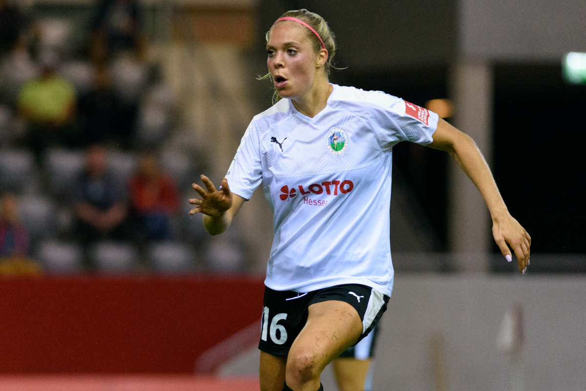 Janina Hechler vs Bayern München